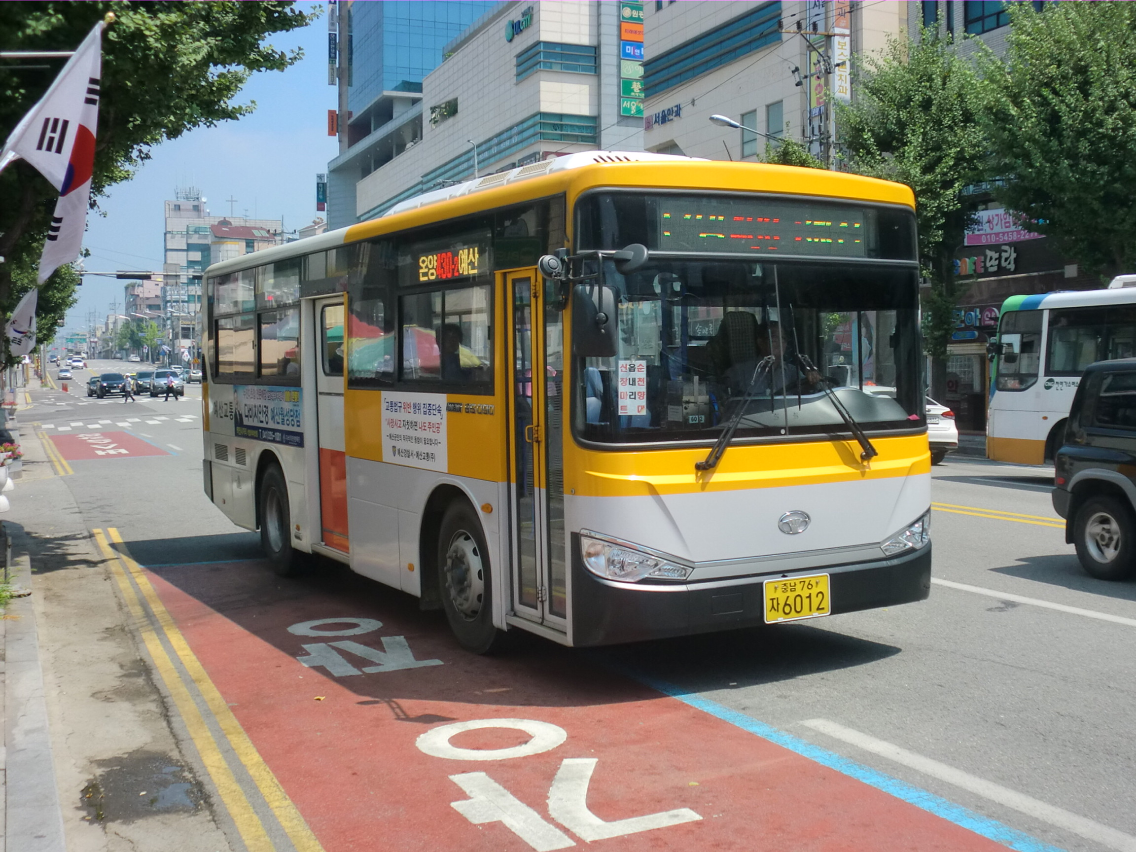 예산군내버스